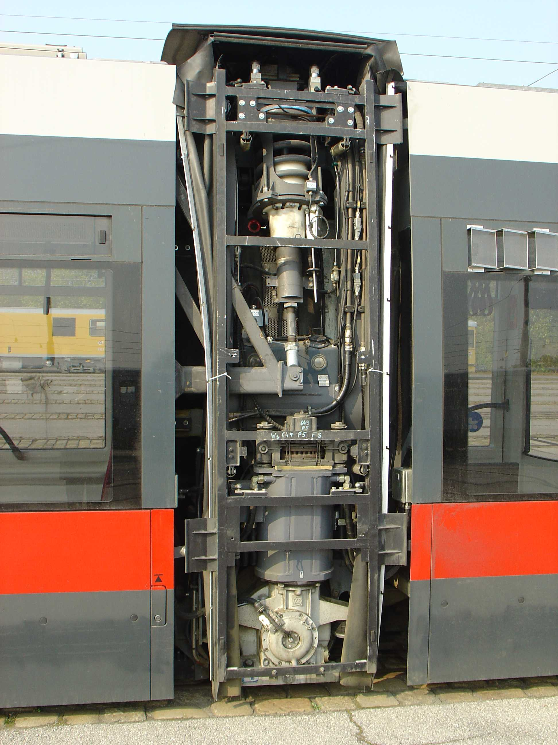 Antriebseinheit für ULF (ultra low floor) tram der Type B (langer ULF) in der Hauptwerkstätte der Wiener Linien. Aufnahme vom 13.10.2006, Vienna, Austria